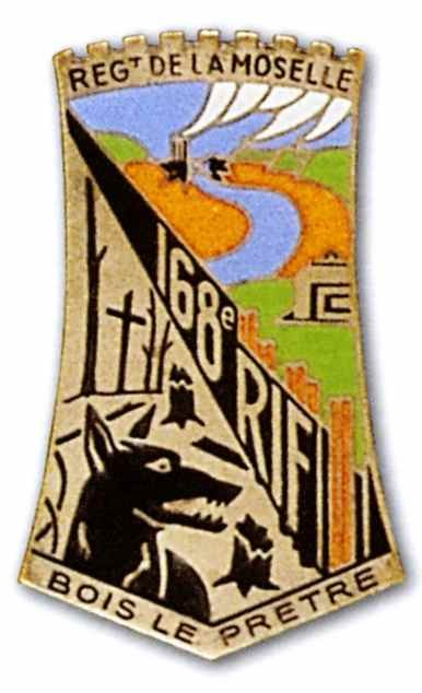 insigne régimentaire du 168e RIF